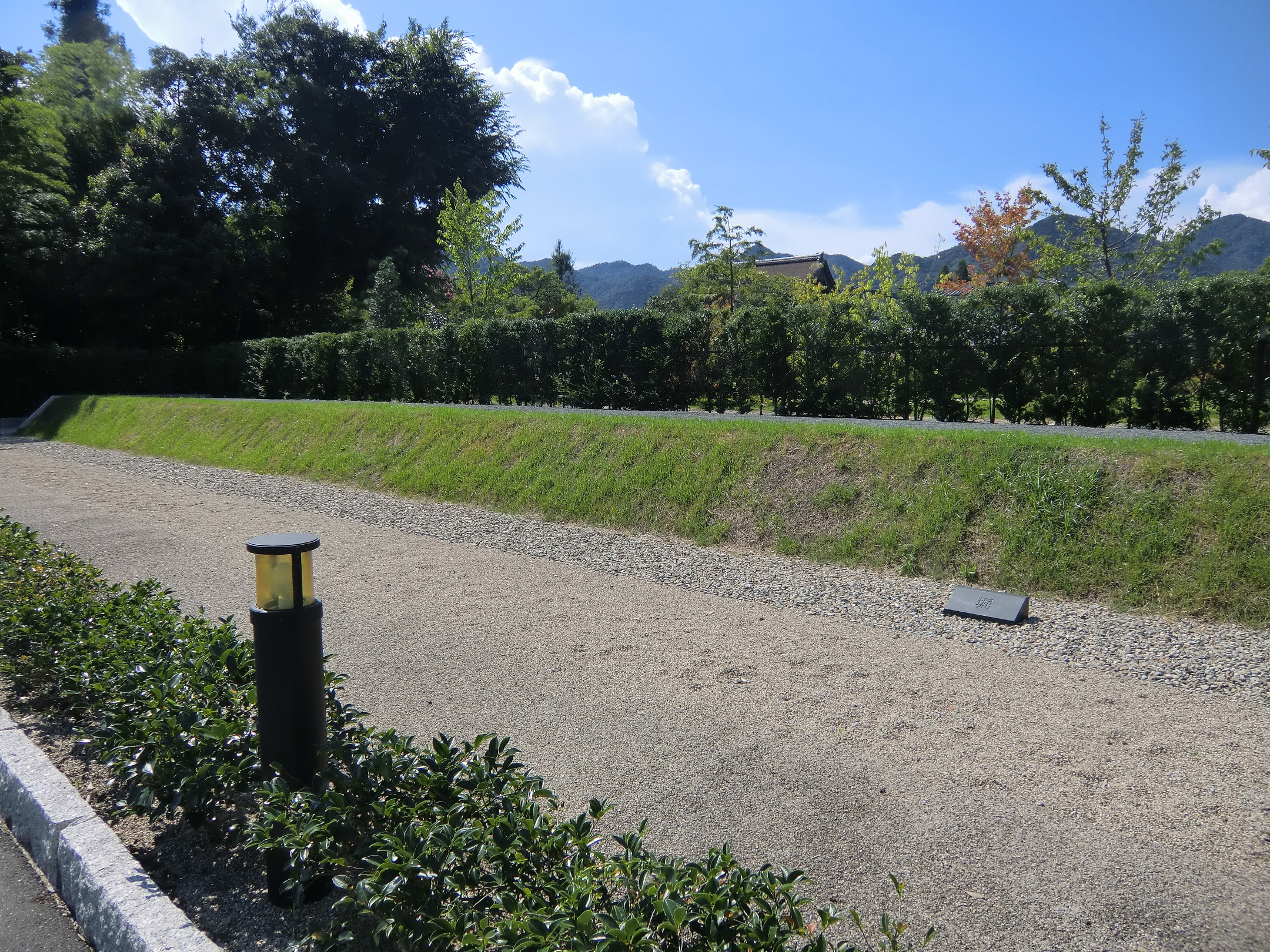 龍福寺（山口市）に復元された大内氏館跡の堀と土塁跡